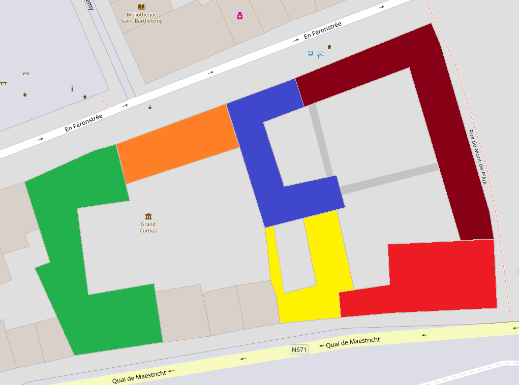 Carte des différents bâtiments du Grand Curtius